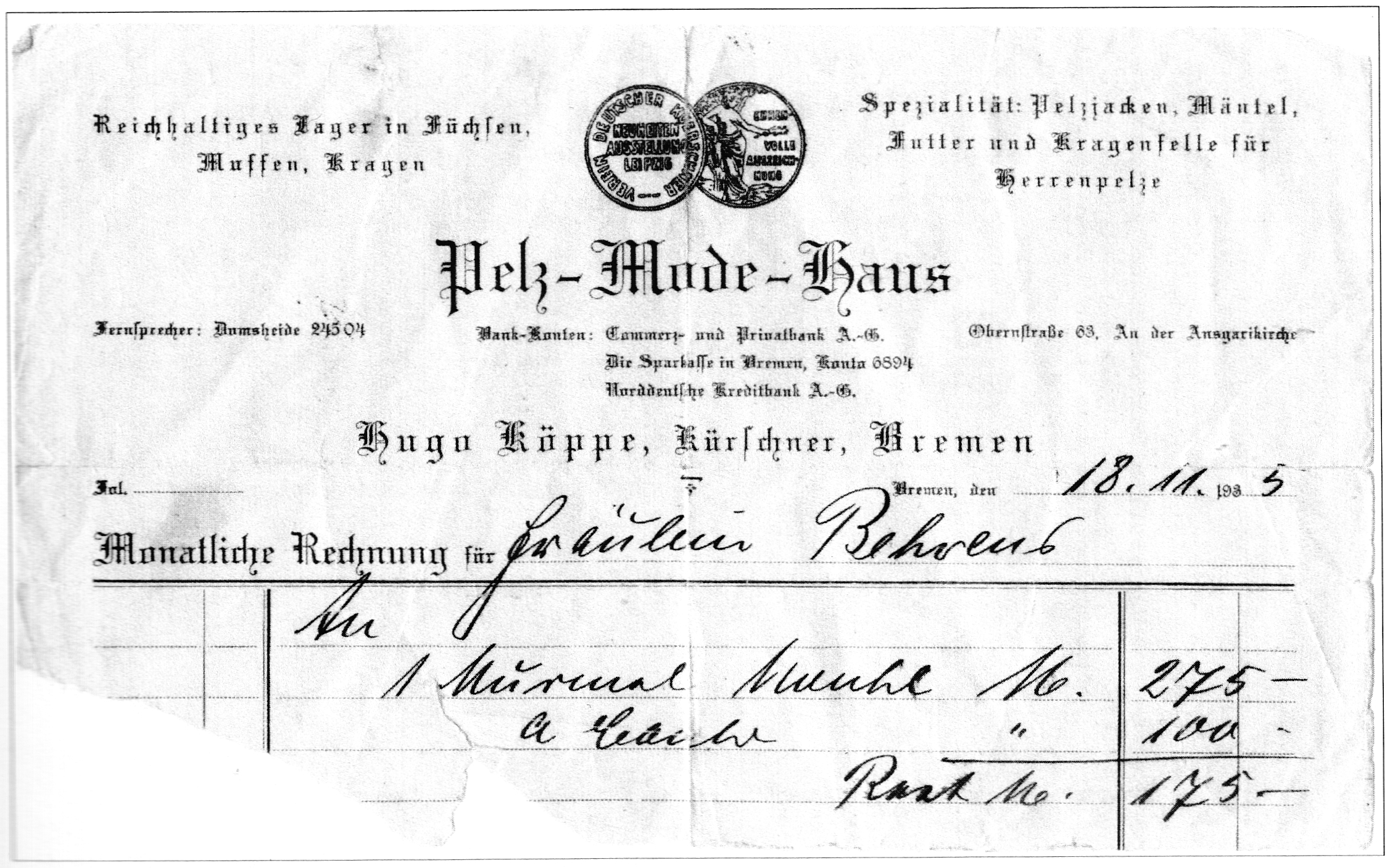 Firma Hugo Köppe, Bremen, Obernstraße 65 An der Angerkirche. Pelze, Leder, Mode. Pelz-Mode-Haus Hugo Köppe, Kürschner, Bremen. Reichhaltiges Lager in Füchsen, Muffen, Kragen. Spezialität: Pelzjacken, Mäntel, Futter und Kragenfelle für Herrenpelze. Monatlich Rechnung für Fräulein Behrens. An 1 Murmel Mantel M. 275,- á conto M. 100, Rest M. 175